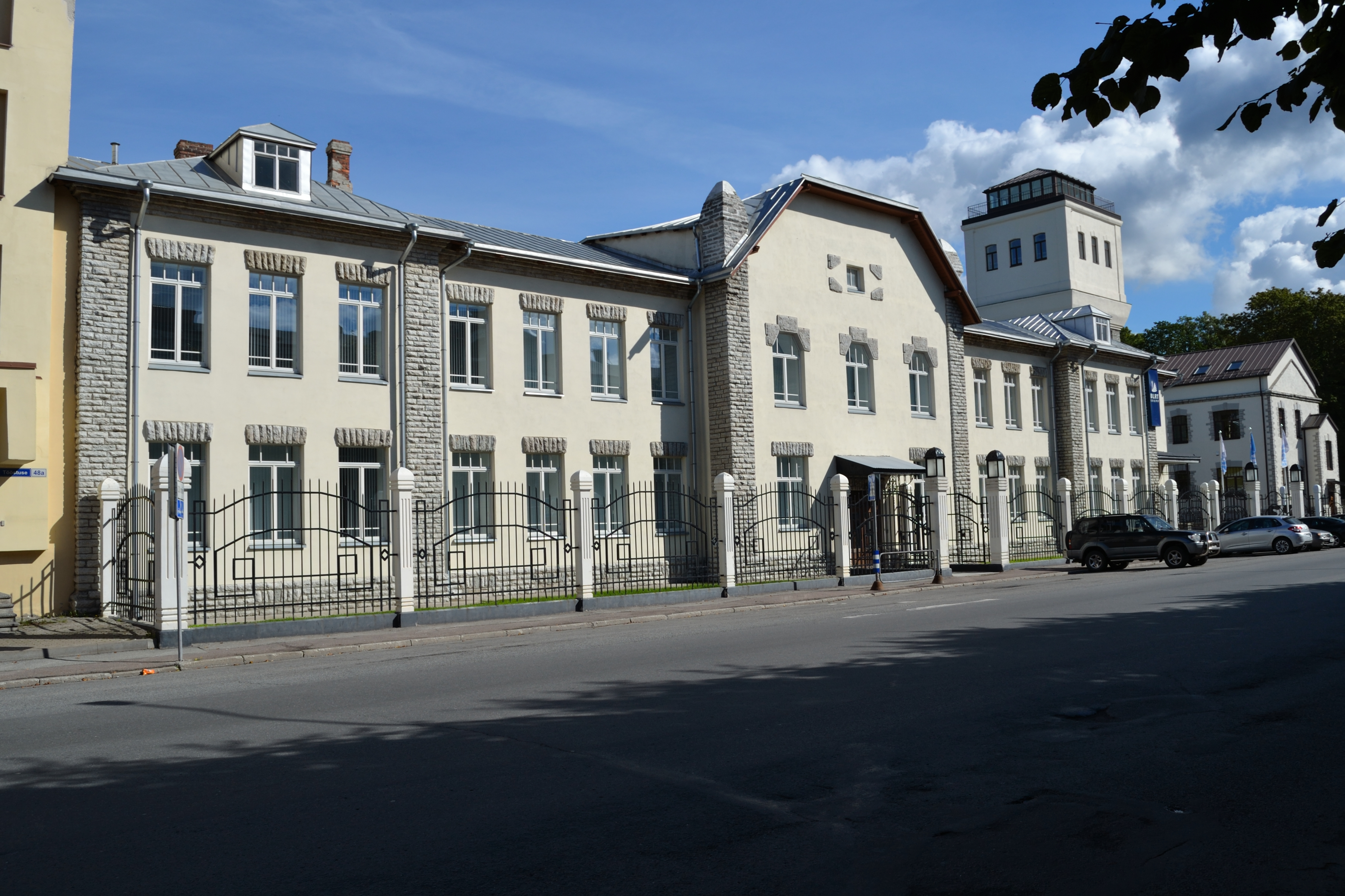 Tallinn, Noblessneri laevatehase administratiivhoone, 1914-1915